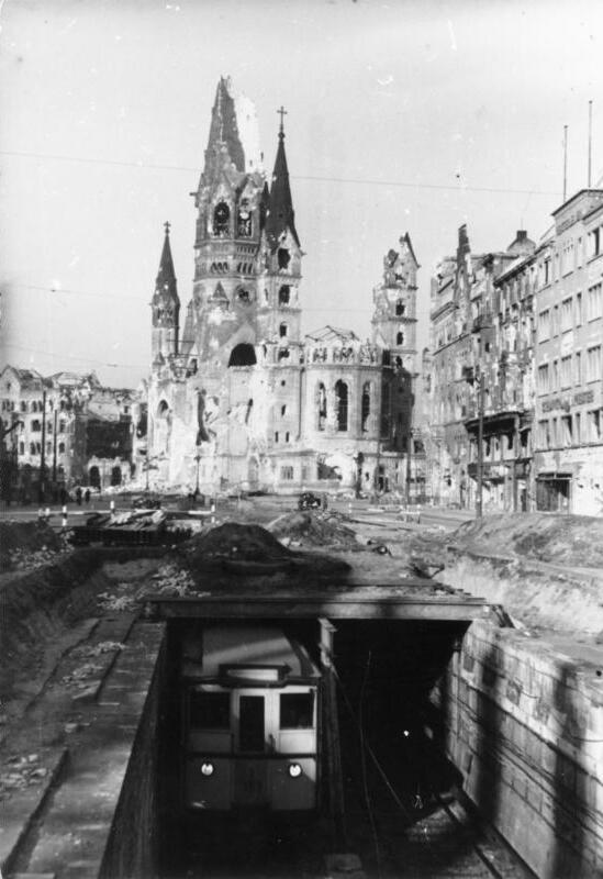 ADN-ZB/Donath Berlin Ein im II. Weltkrieg zerstörter U-Bahn-Schacht in der Tauentzienstraße. Im Hintergrund die zerstörte Kaiser-Wilhelm-Gedächstniskirche am Auguste-Viktoria-Platz (umbenannt in Breitscheidplatz /Westberlin). Aufn. 1945